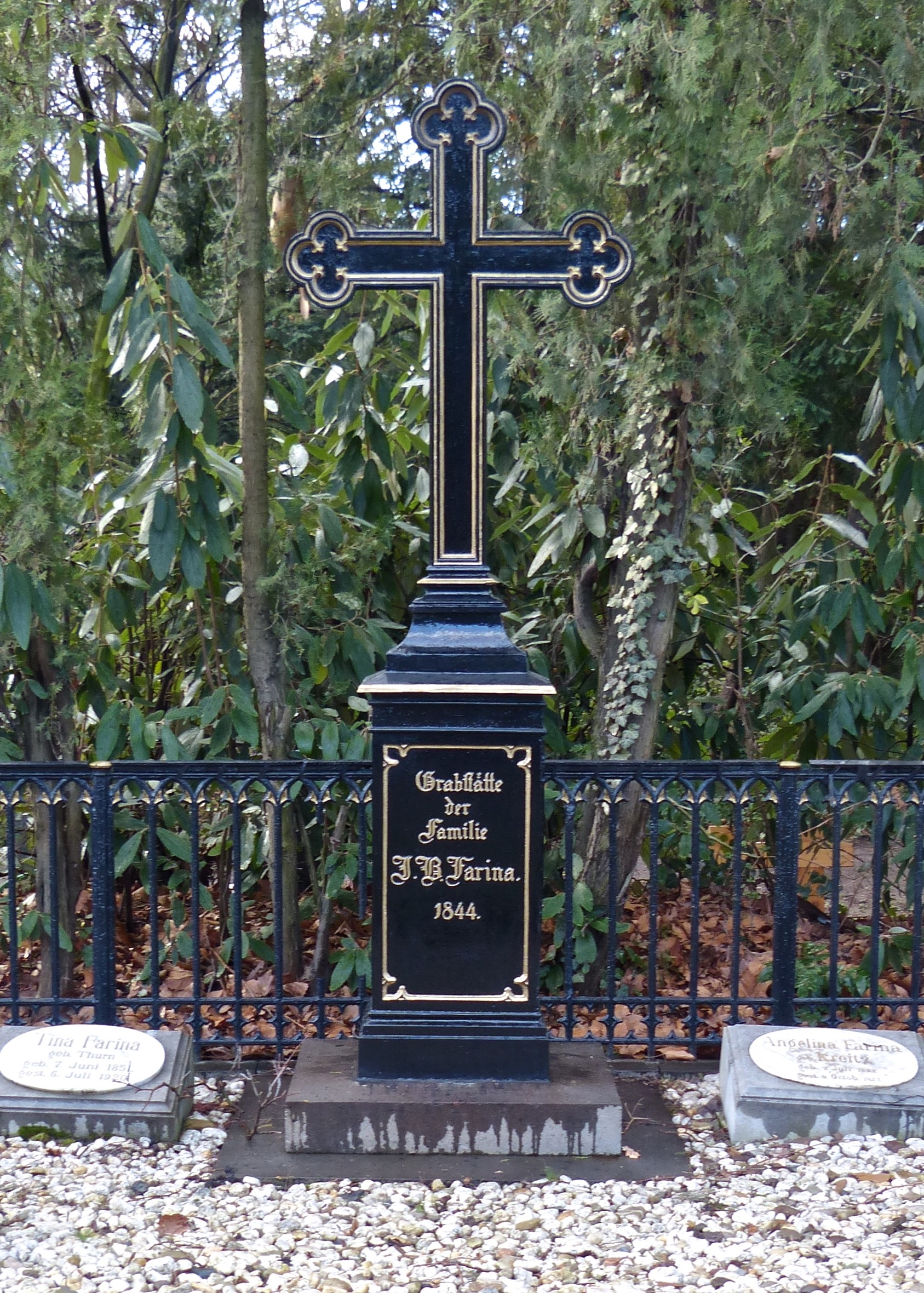 Grabstelle Johann Baptist Farina auf dem Friedhof Melaten (Detail)